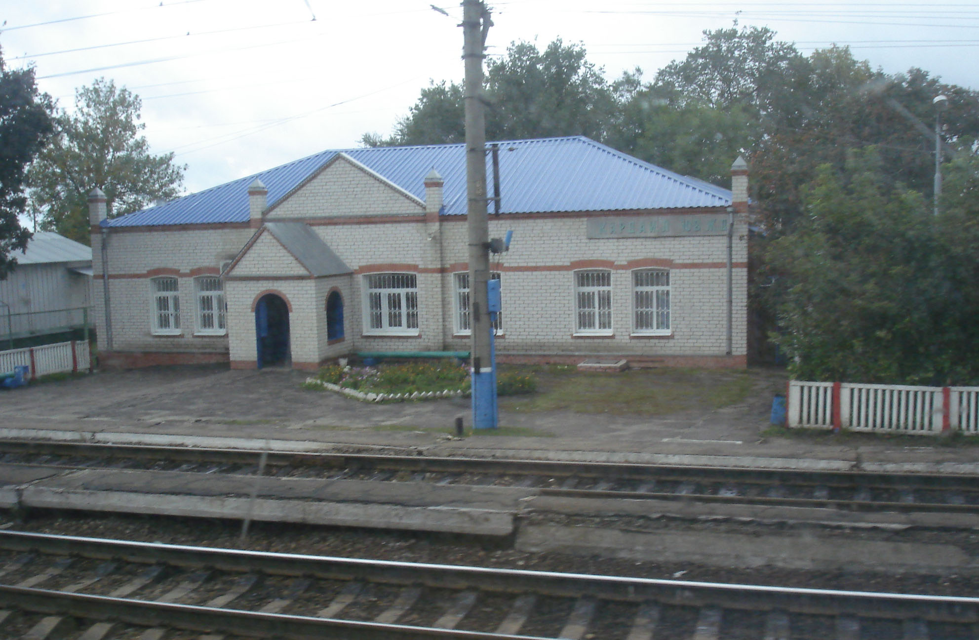 Кардаил, здание после ремонта крыши